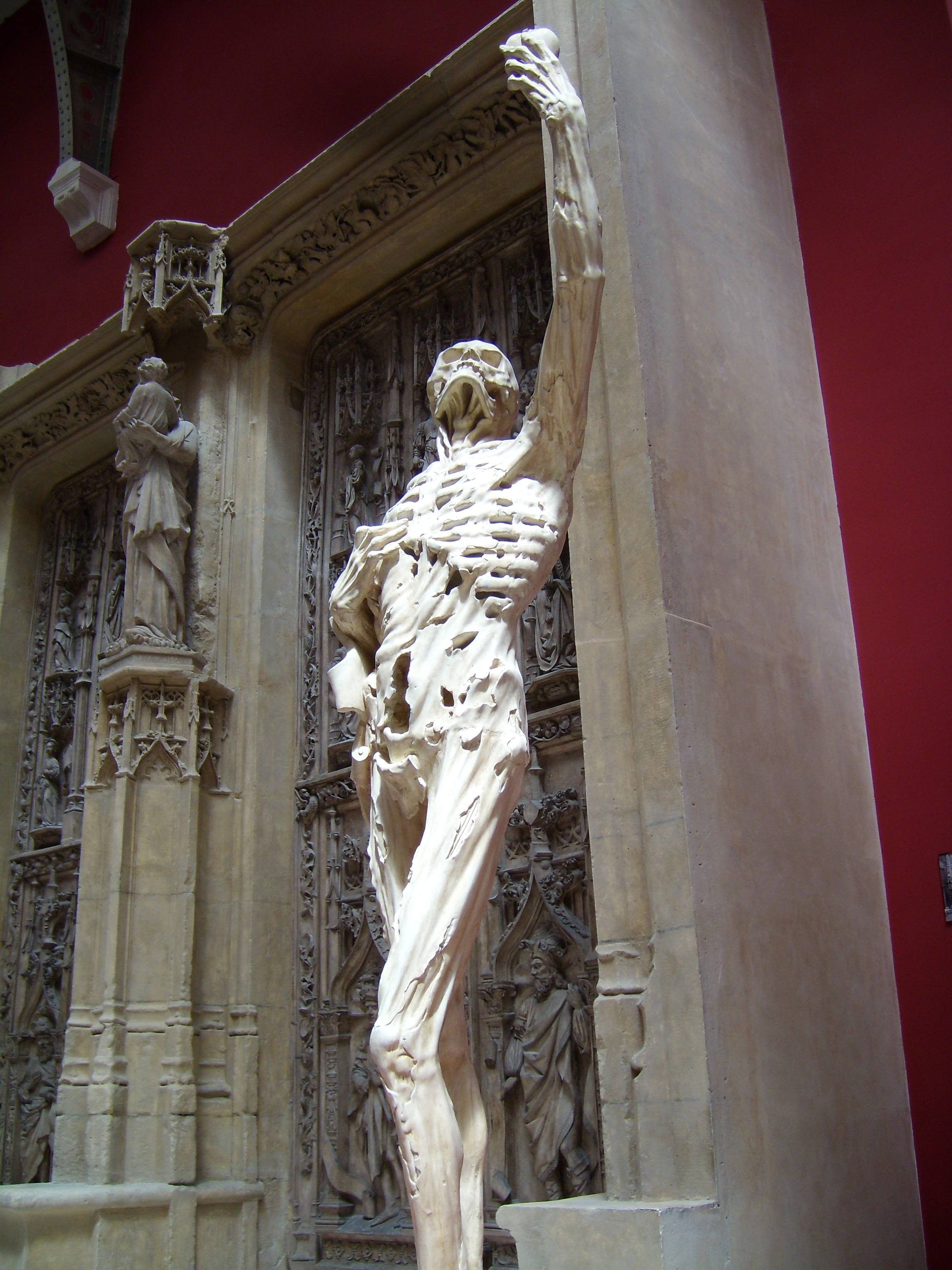 Galerie des Moulages, Musée des Monuments français, Paris Le Squelette (XVIe s.), église collégiale Saint-Maxe de Bar-Le-Duc (Meuse, France), par Ligier Richier (1500-1567). Moulage présenté au musée des Monuments français, Paris, ~ 1948